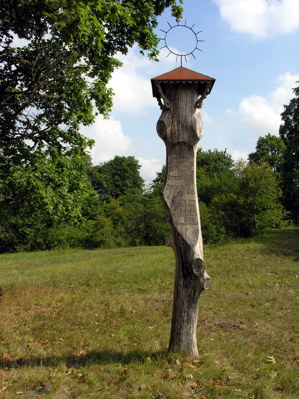 Santekliai, Mažeikių raj., Viekšnių seniūnija Stogastulpis Santeklių dvaro šeimininkių atminimui, past. 1999 m. Foto: Algirdas, 2006 m. rugpjūčio 15 d., Lietuva